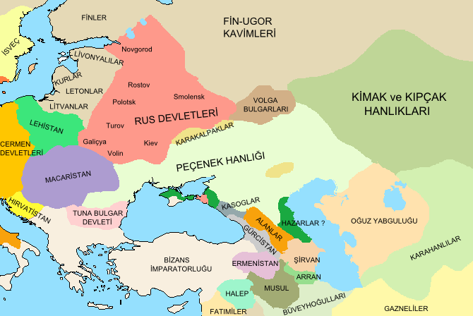 Hazarların çöküş dönemine dair bir harita.